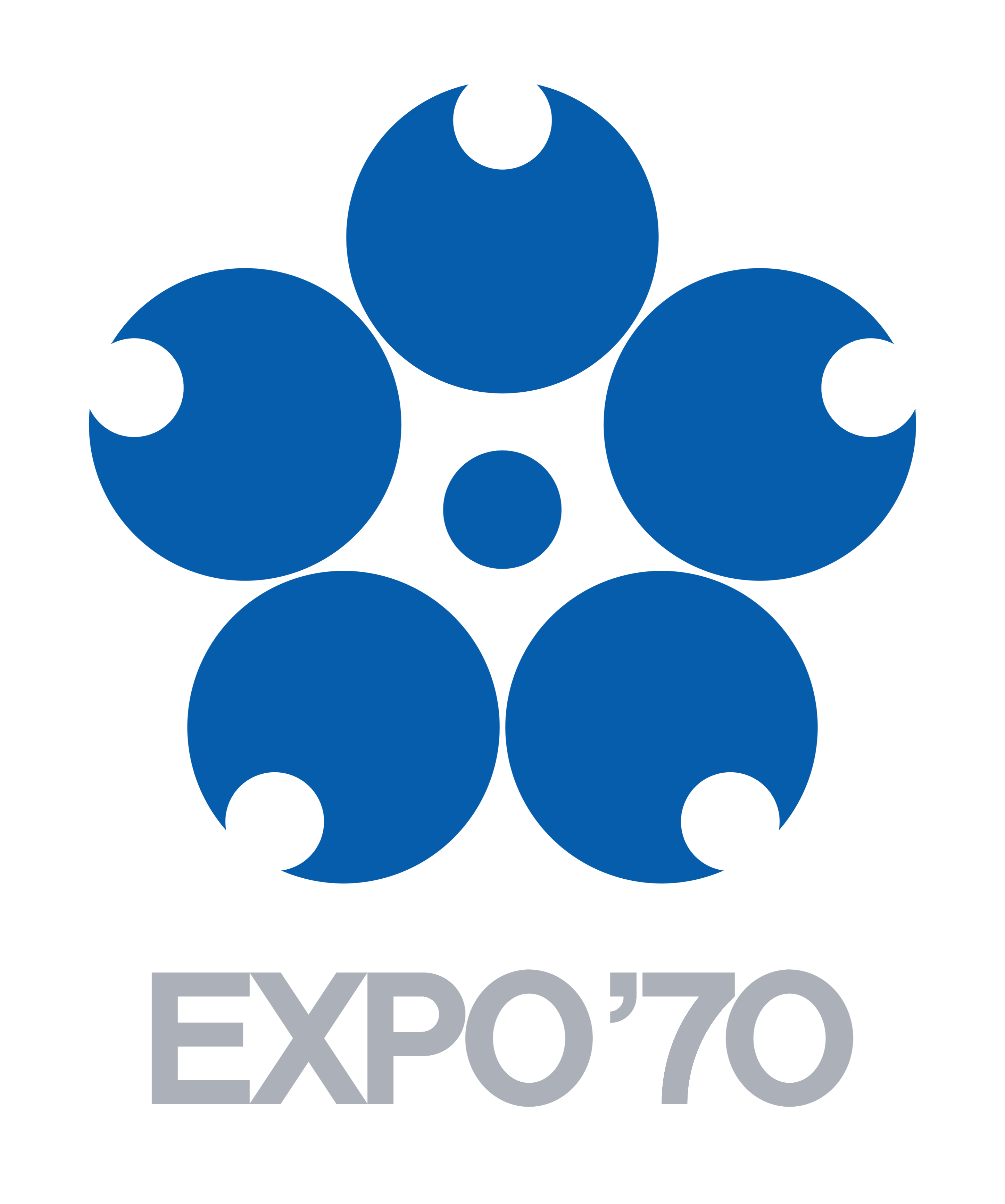 日本万国博覧会のシンボルマークです。